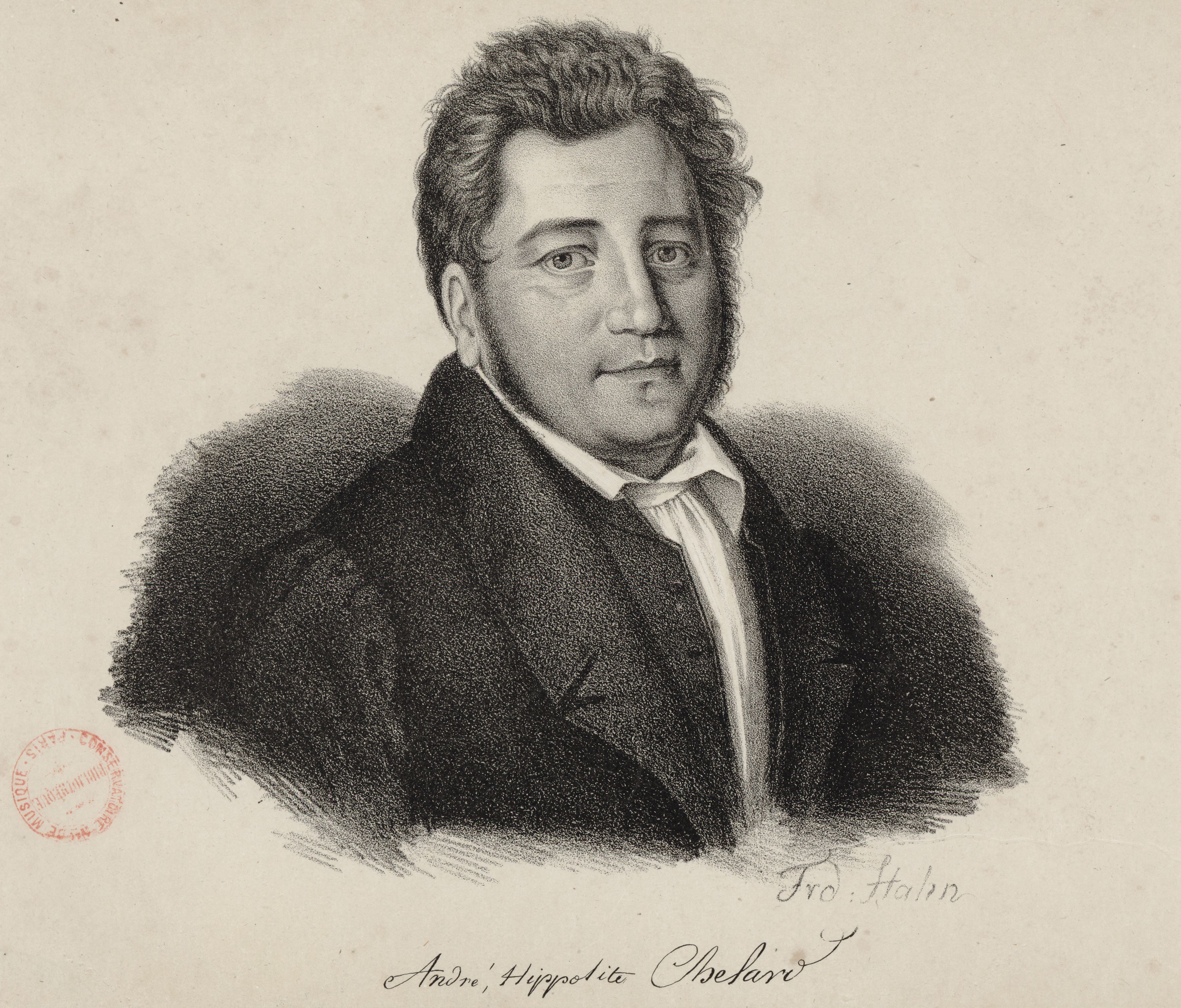 André Hippolyte Chélard (1789-1861), French composer